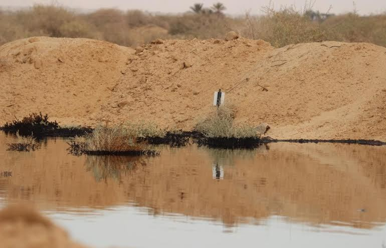 שרידי דליפת הדלק בשמורת הטבע בעברונה בנגב